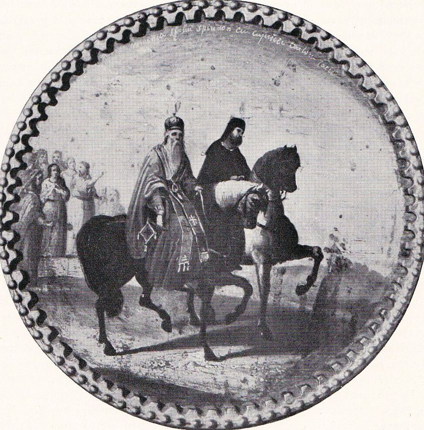 Nicolae Grigorescu - Medalion din Icoana Sfantului Spiridon, intitulată Minunea cu capetele cailor. Acest medalion este amplasat sub icoana Sfântului Spiridon, el fiind cel de al zecelea din întreaga icoană.